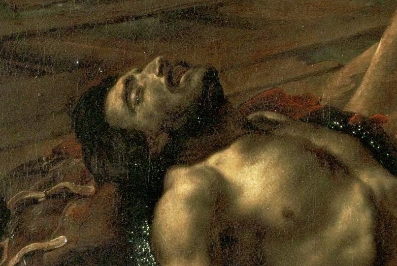 Fragmento del cuadro de Géricault - La Balsa del Medusa en el que aparece Eugène Delacroix en el que hizo de modelo.